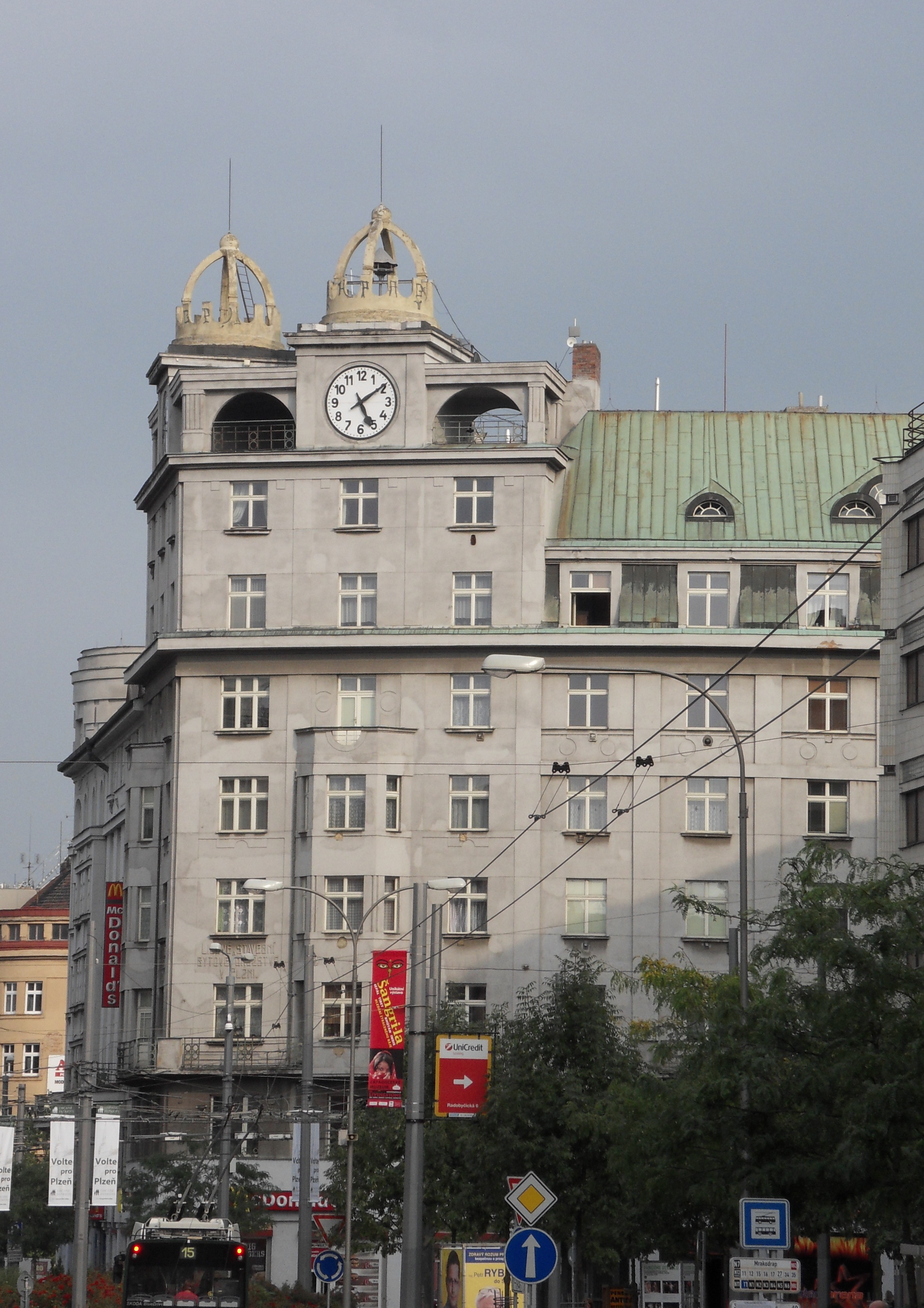 Mrakodrap, Plzeň 3-Jižní Předměstí, Prokopova 13/15, Americká 13/44, 1698/46, 1697/48, Anglické nábřeží 1697/12, Plzeň.